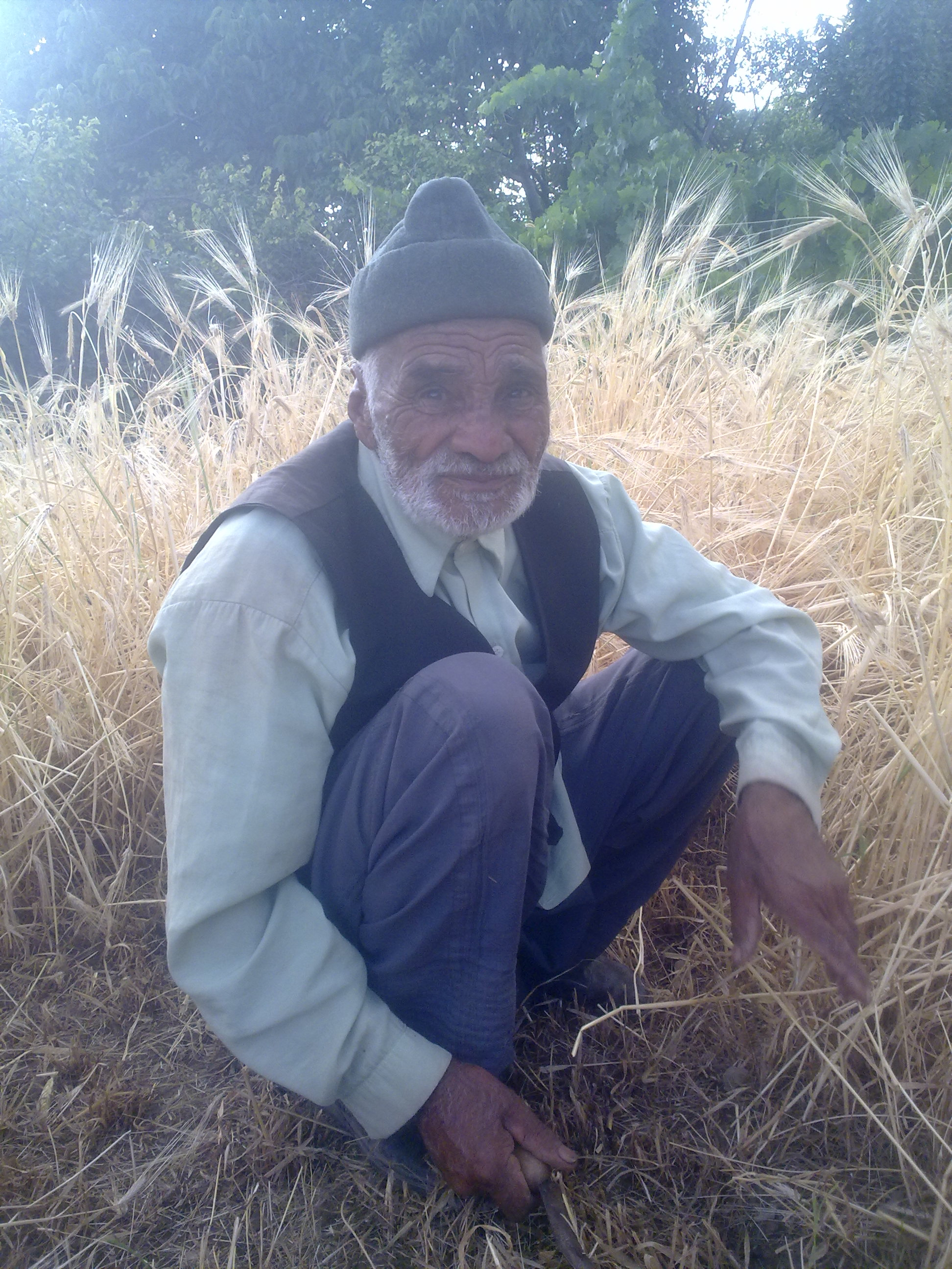 برداشت محصول در کلاته سلطانی